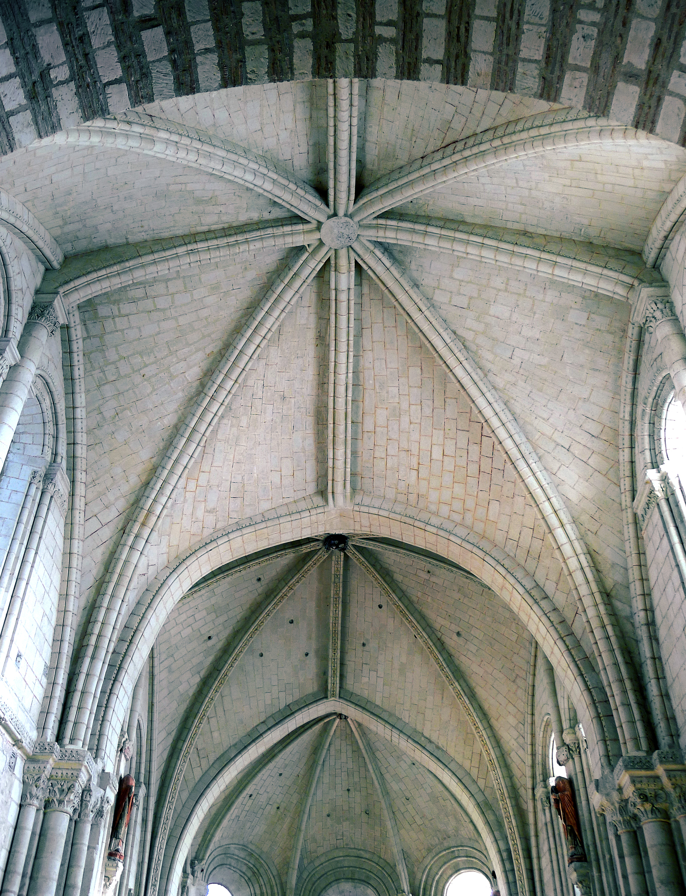 Église Saint-Martin d'Angers (voute du choeur)